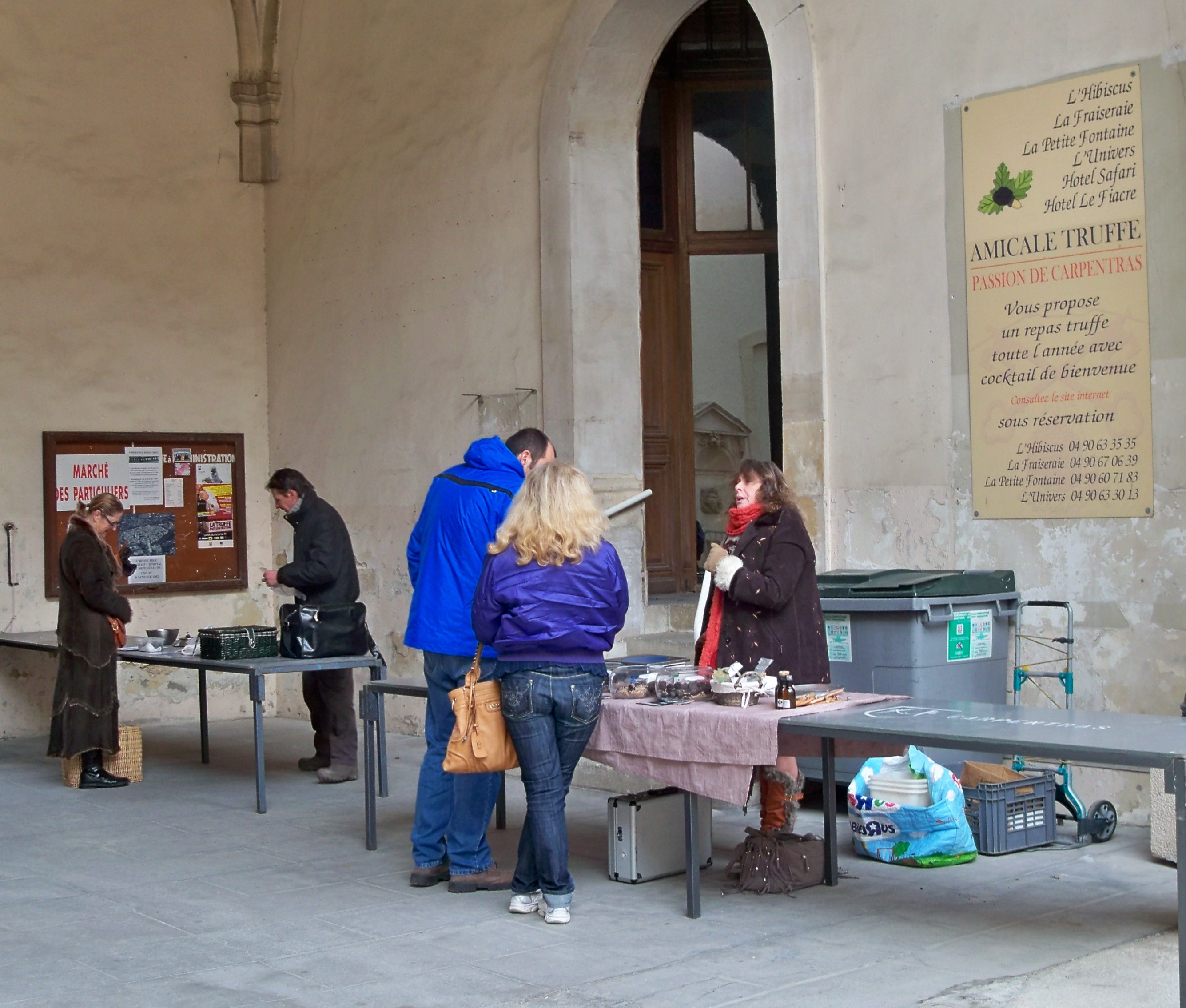 Stands du marché hebdomadaire aux truffes, à Carpentras (84)